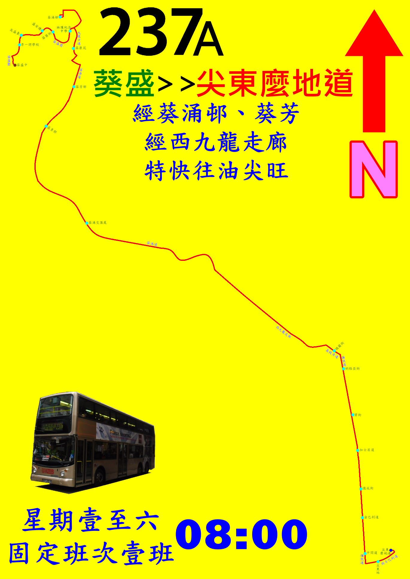 中文（香港）: 九巴237A線的走線圖